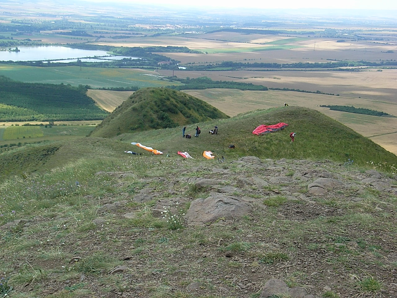 Paragliding na Rané.